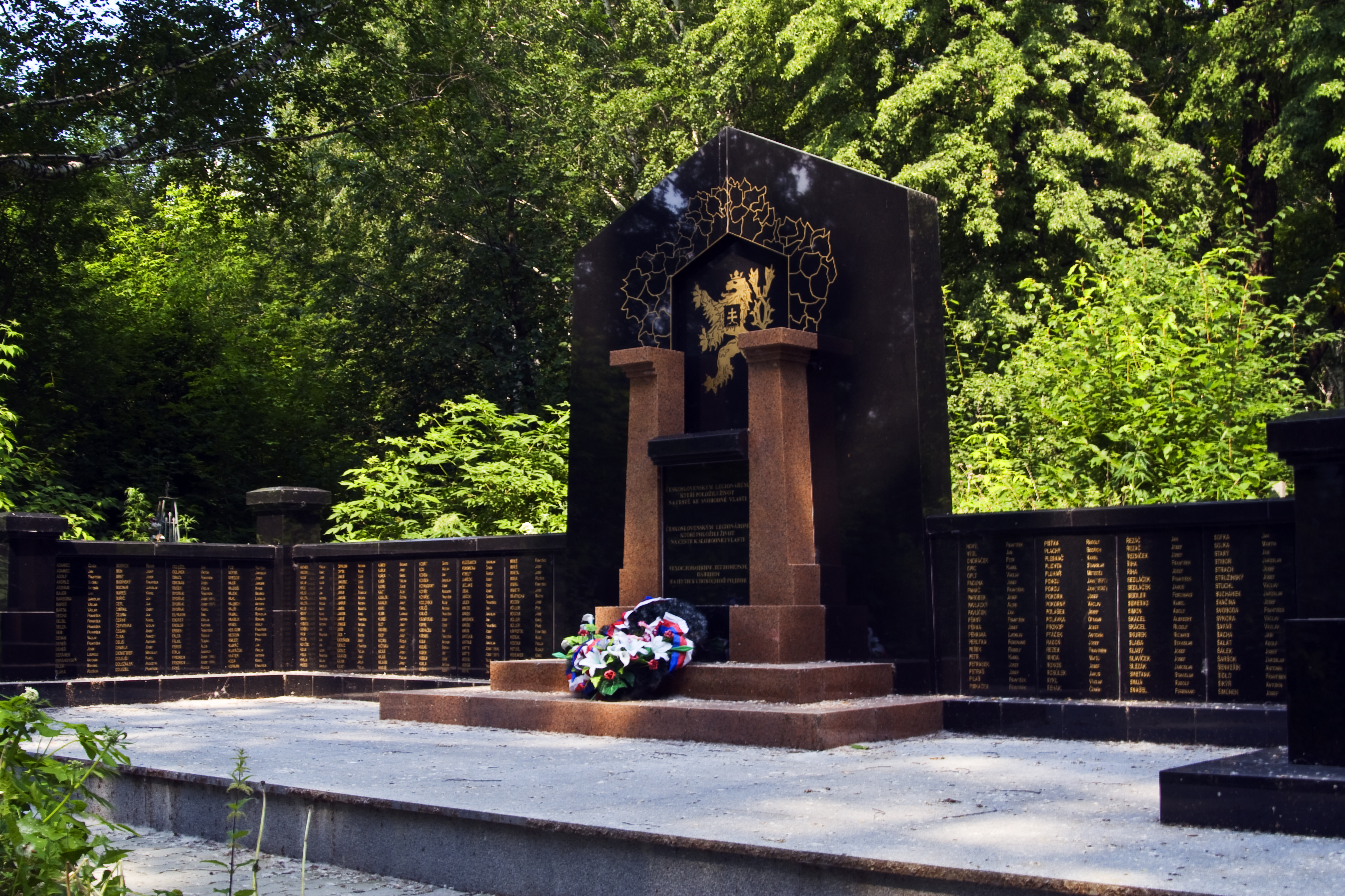 Kirovskiy rayon, Yekaterinburg, Sverdlovskaya oblast', Russia